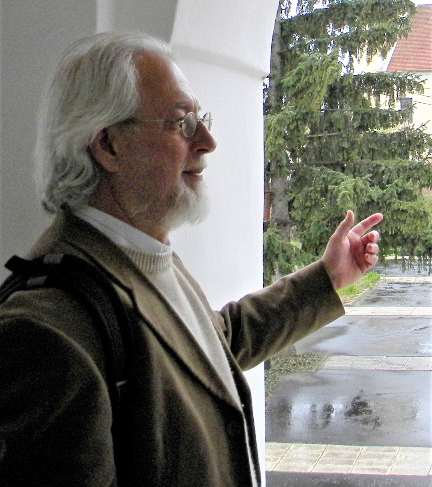 Festival d'italiano Sárospatakon 2012